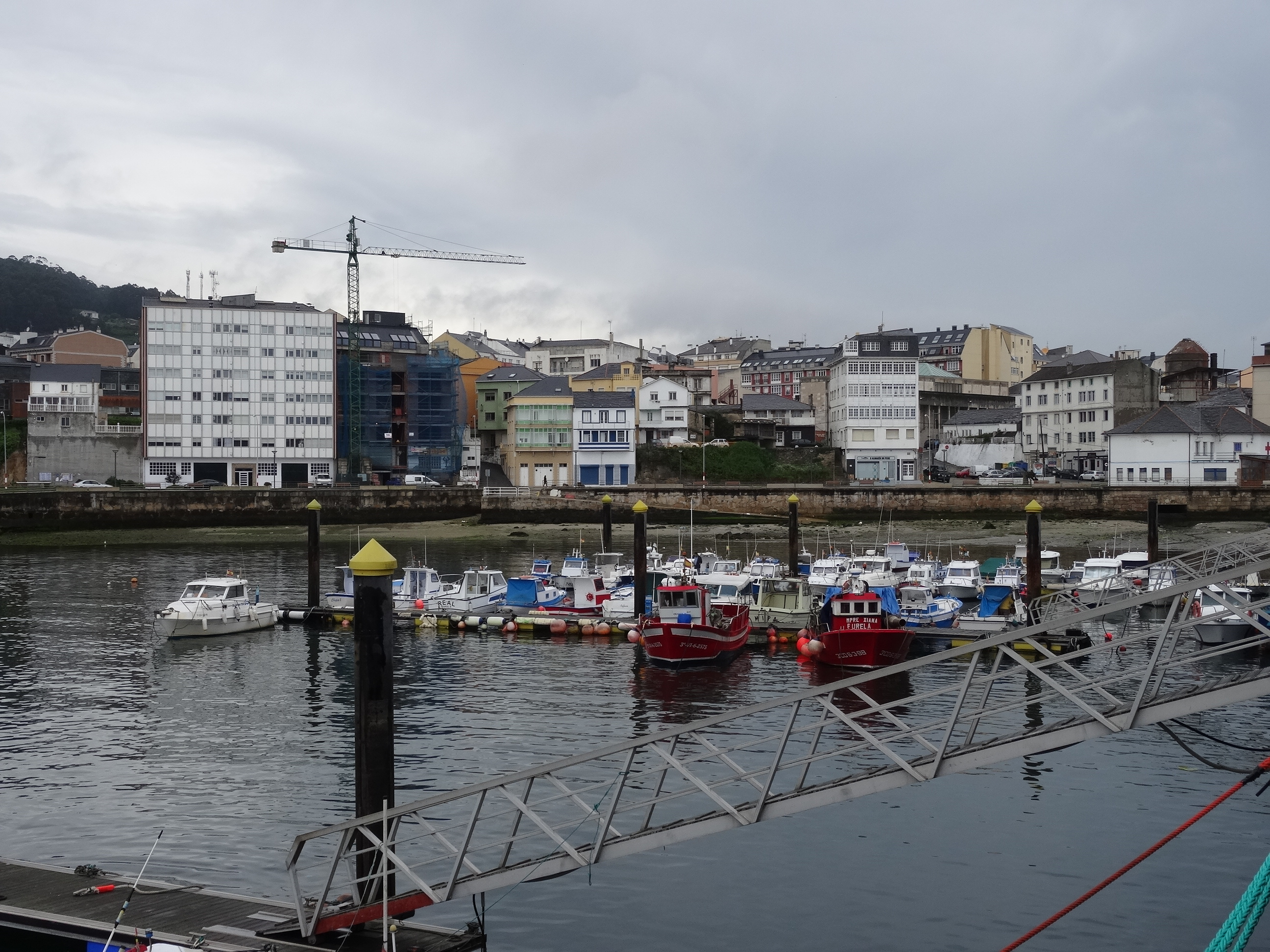 Porto de Burela, Lugo.